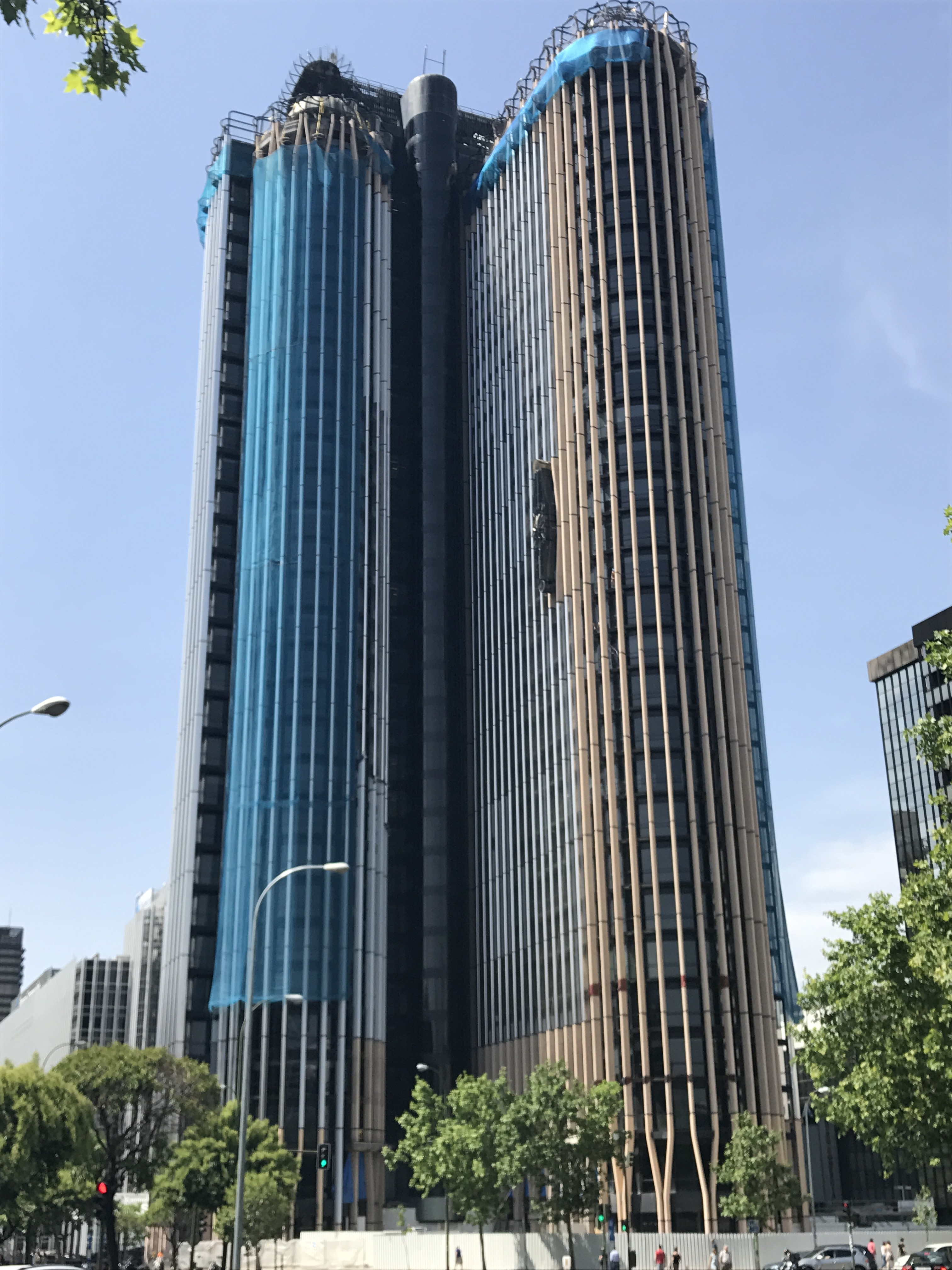 Torre Europa, detalle cambio fachada